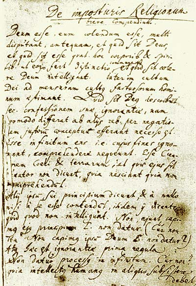 Prima pagina del manoscritto "De imposturis religionum breve compendium" o "De tribus impostoribus", 1688, in Wien, Österreichische Nationalbibliothek, cod. 10450